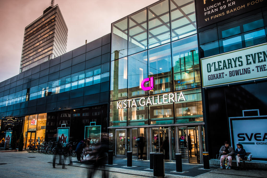 Kista Galleria Entrance, Stockholm, Sweden - oct17